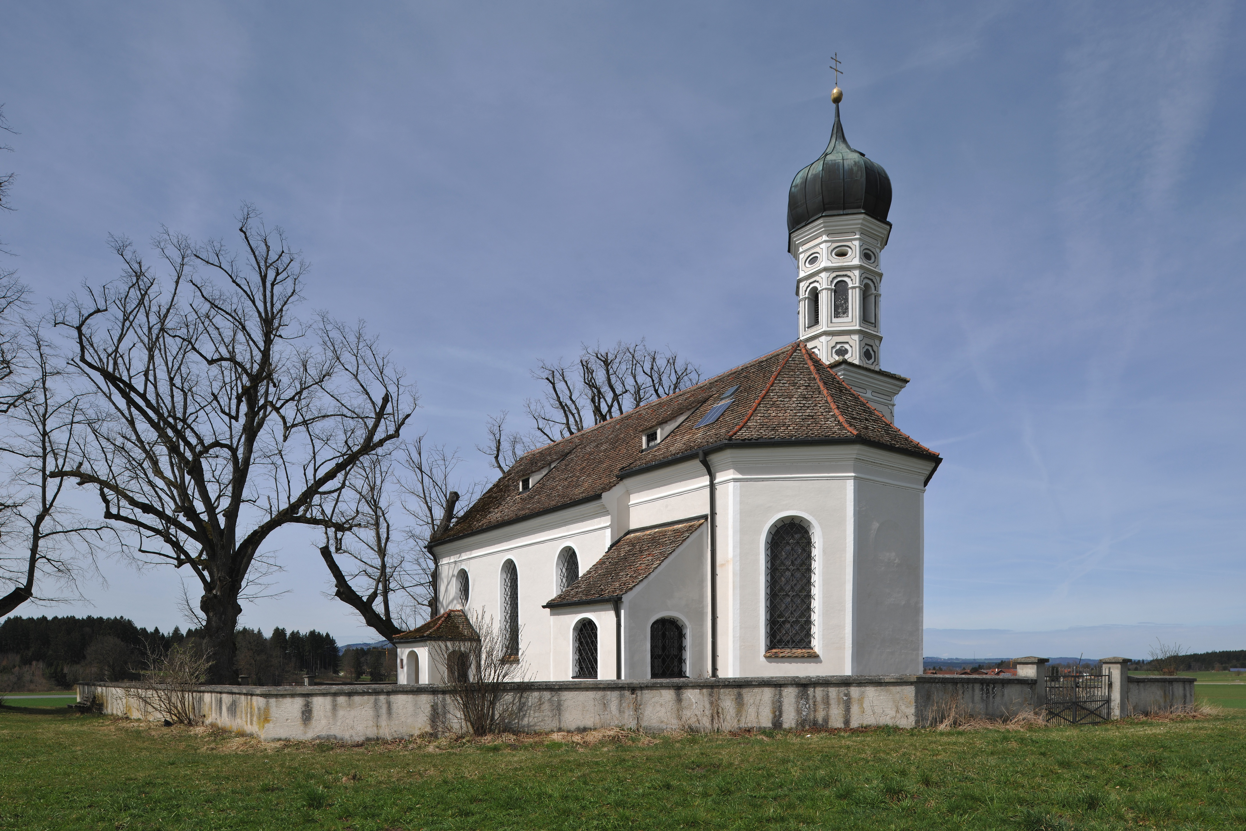 Weilheim-Schongau, Polling, Eberfinger Straße 2. Katholische Filialkirche St. Andrä.